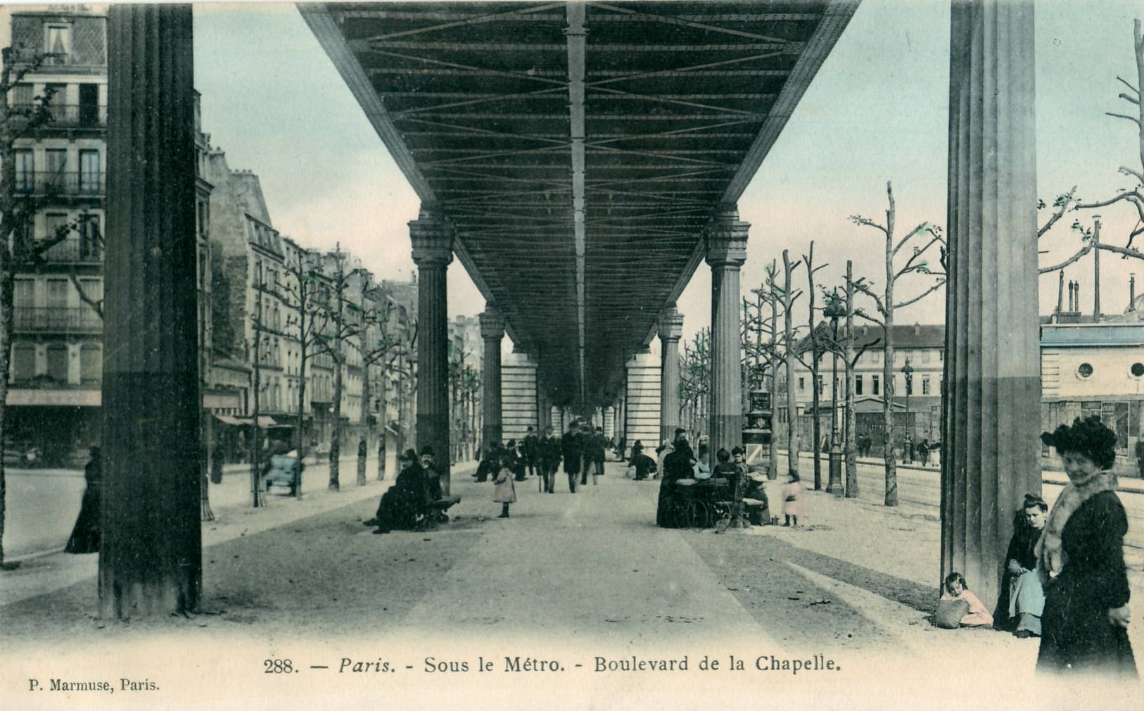 Carte postale ancienne éditée par Marmuse, N°288Paris : Sous le Métro - Boulevard de la Chapelle